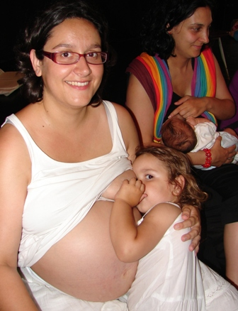 Lactancia materna